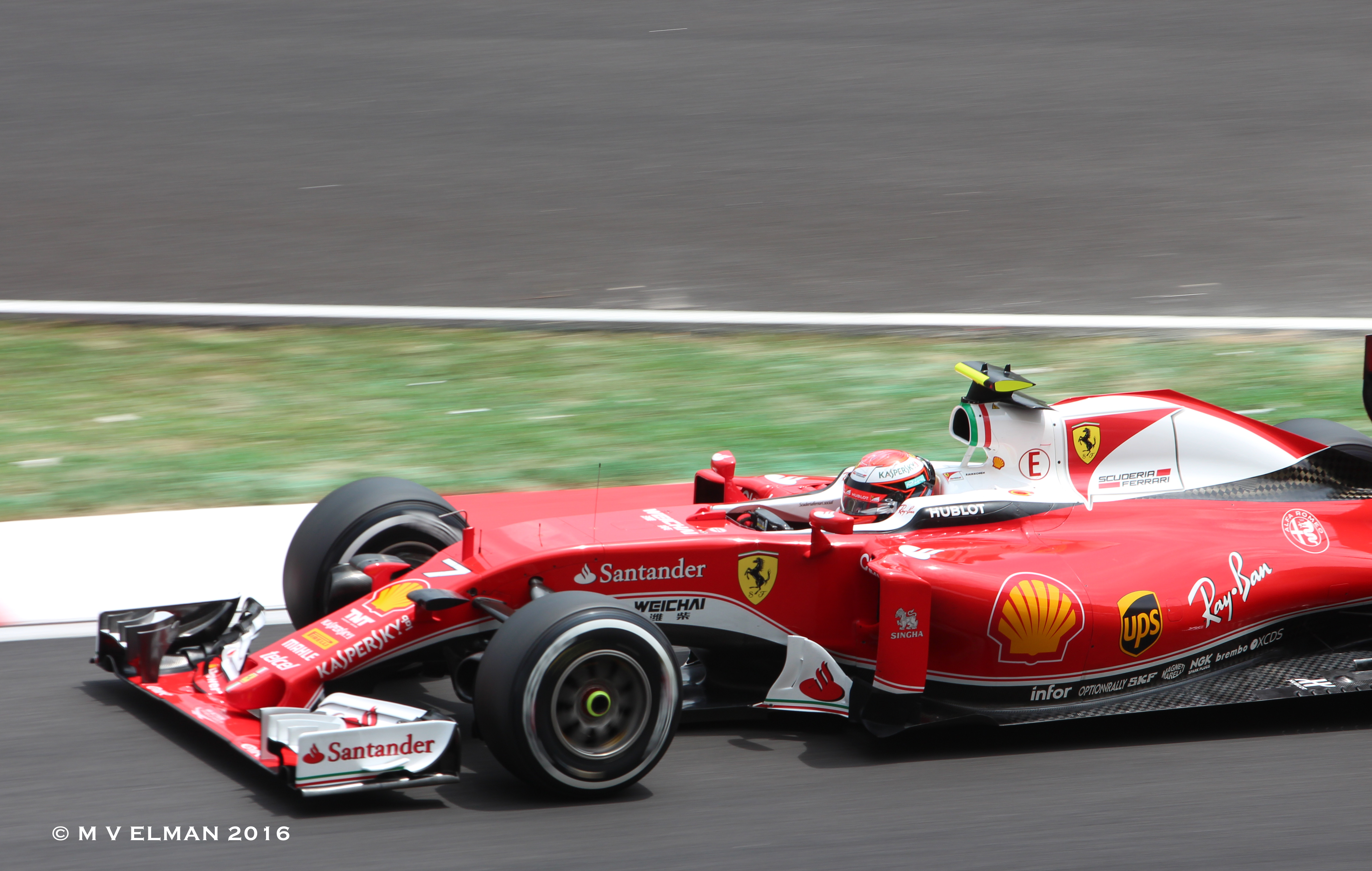 Kimi Raikkonen - Scuderia Ferrari SF16-H